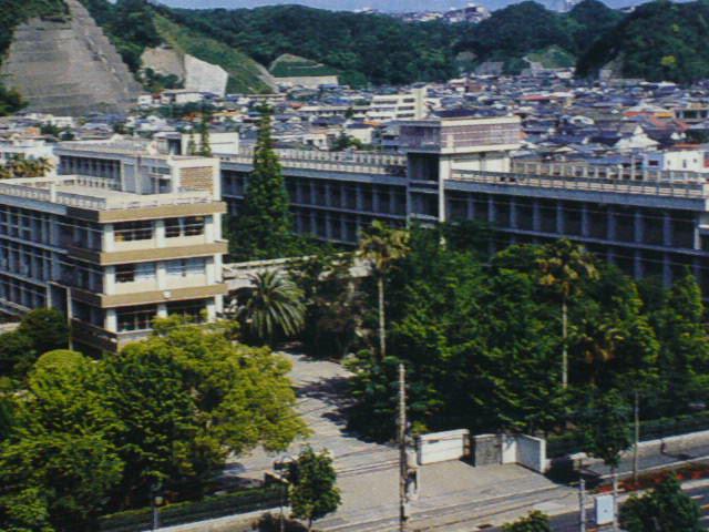 鶴丸高校校舎